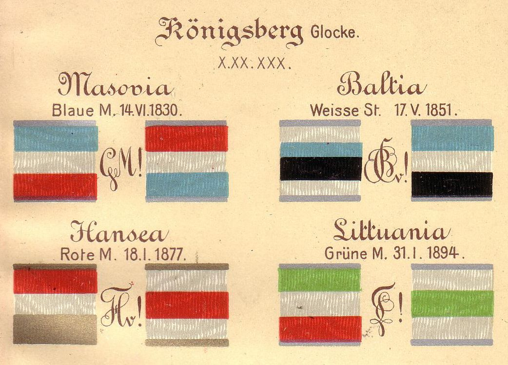 Couleur der vier Corps in Königsberg (Preußen)